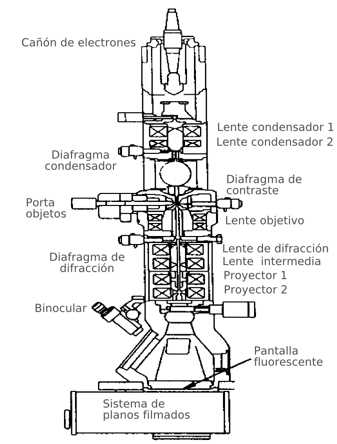 Schéma d'un microscope électronique en transmission Source : département de science des matériaux de Polytech'Lille [1]